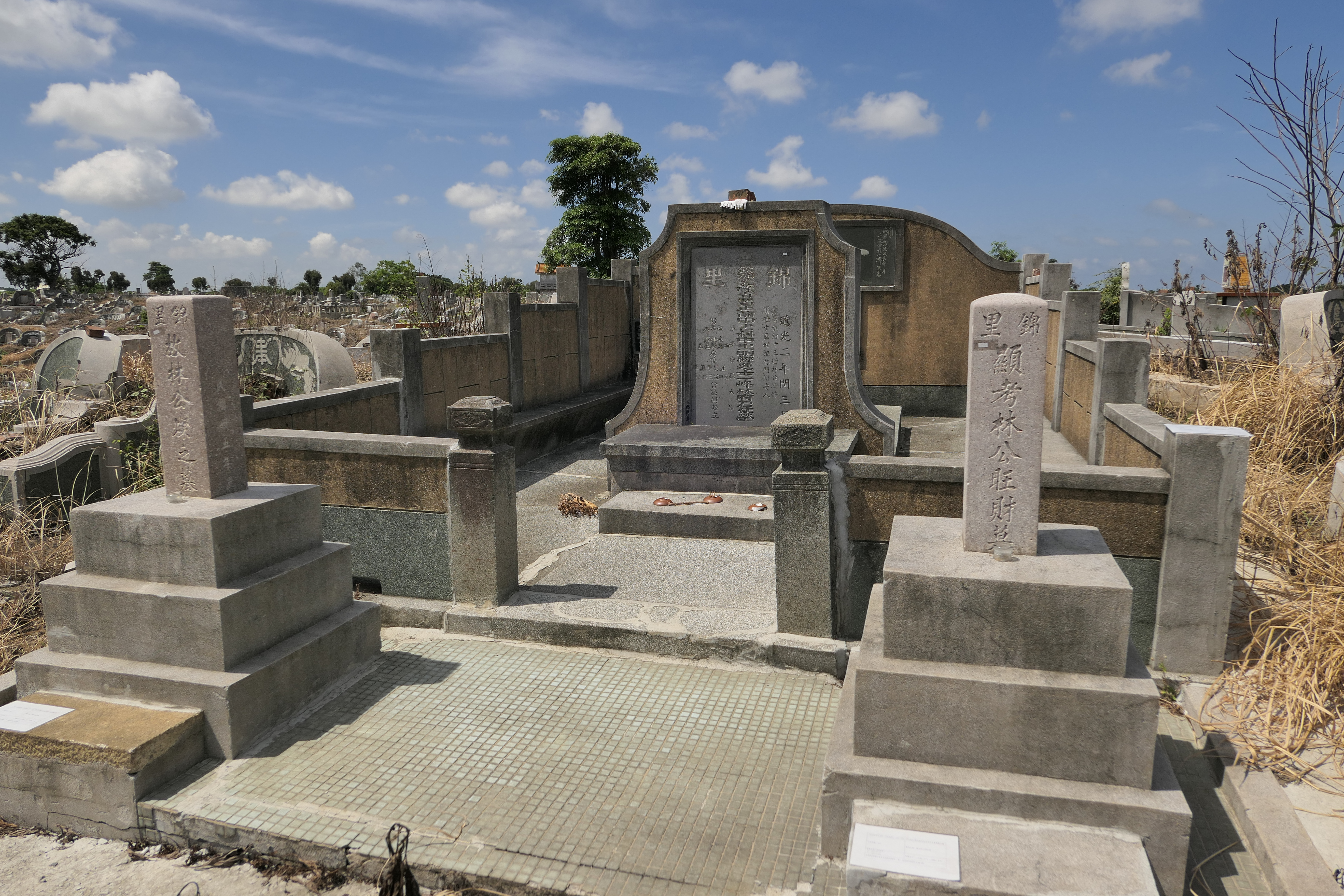 中文（台灣）: 林朝英墓，在南山橋附近的山丘上